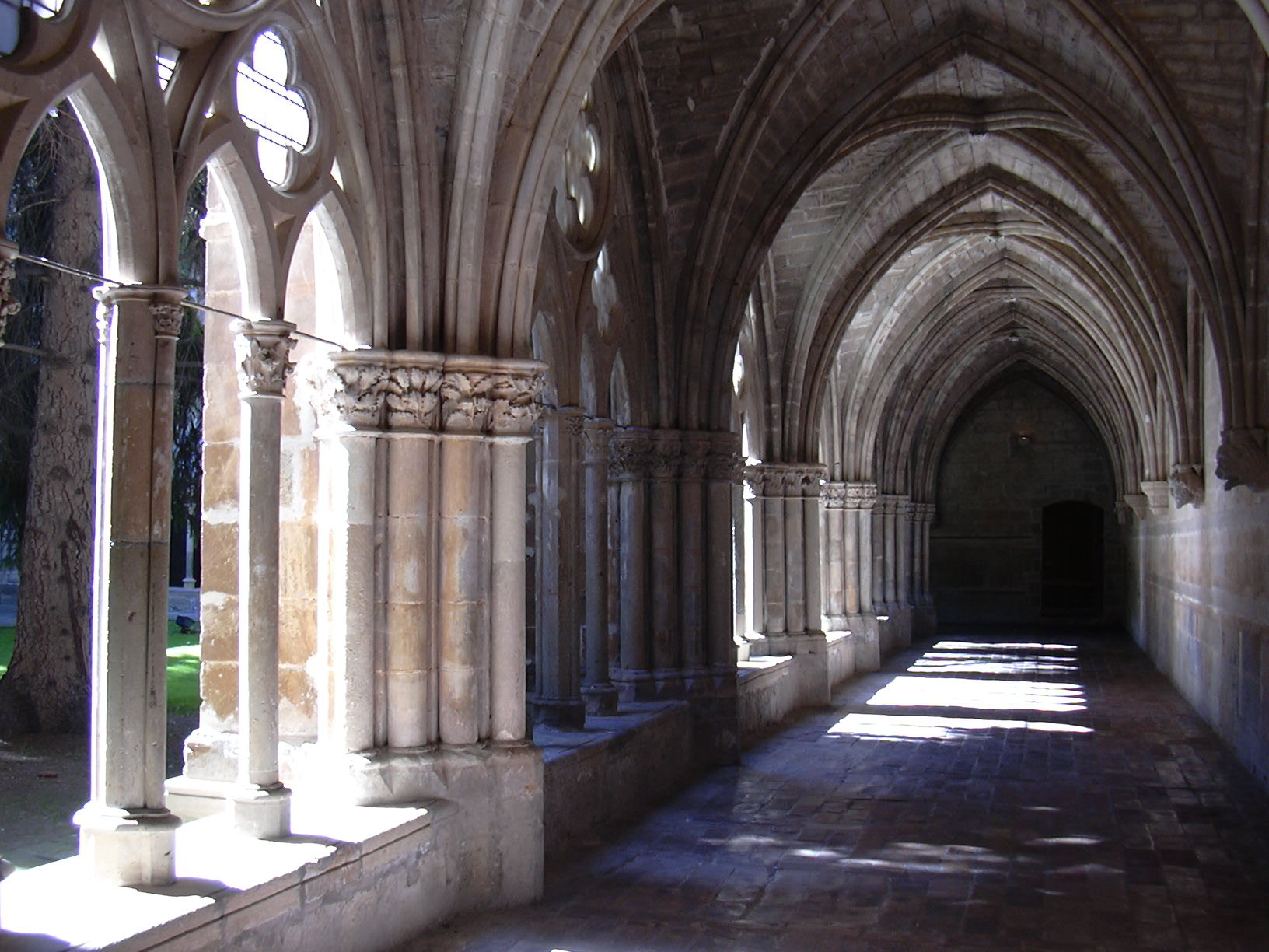 Veruela - Claustro - Vista